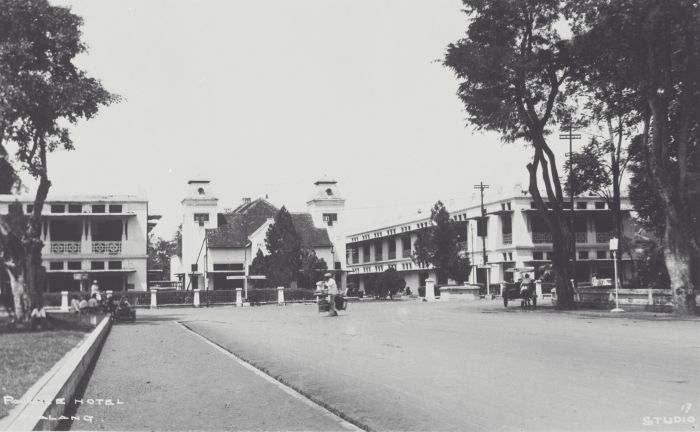 Foto. Palace hotel te Malang in Oost-Java